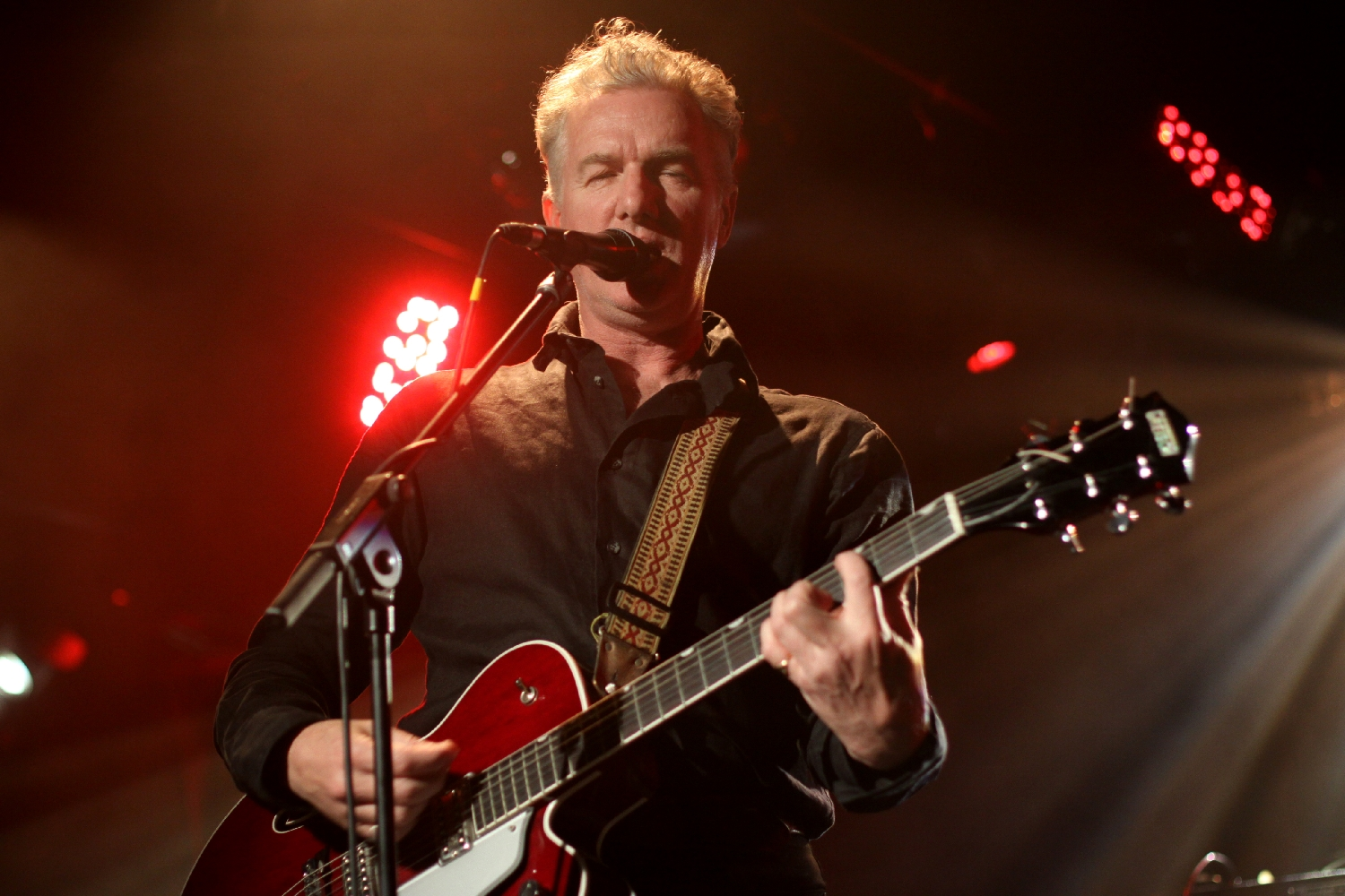 Мик Харви (Nick Cave and the Bad Seeds, Crime and the City Solution)